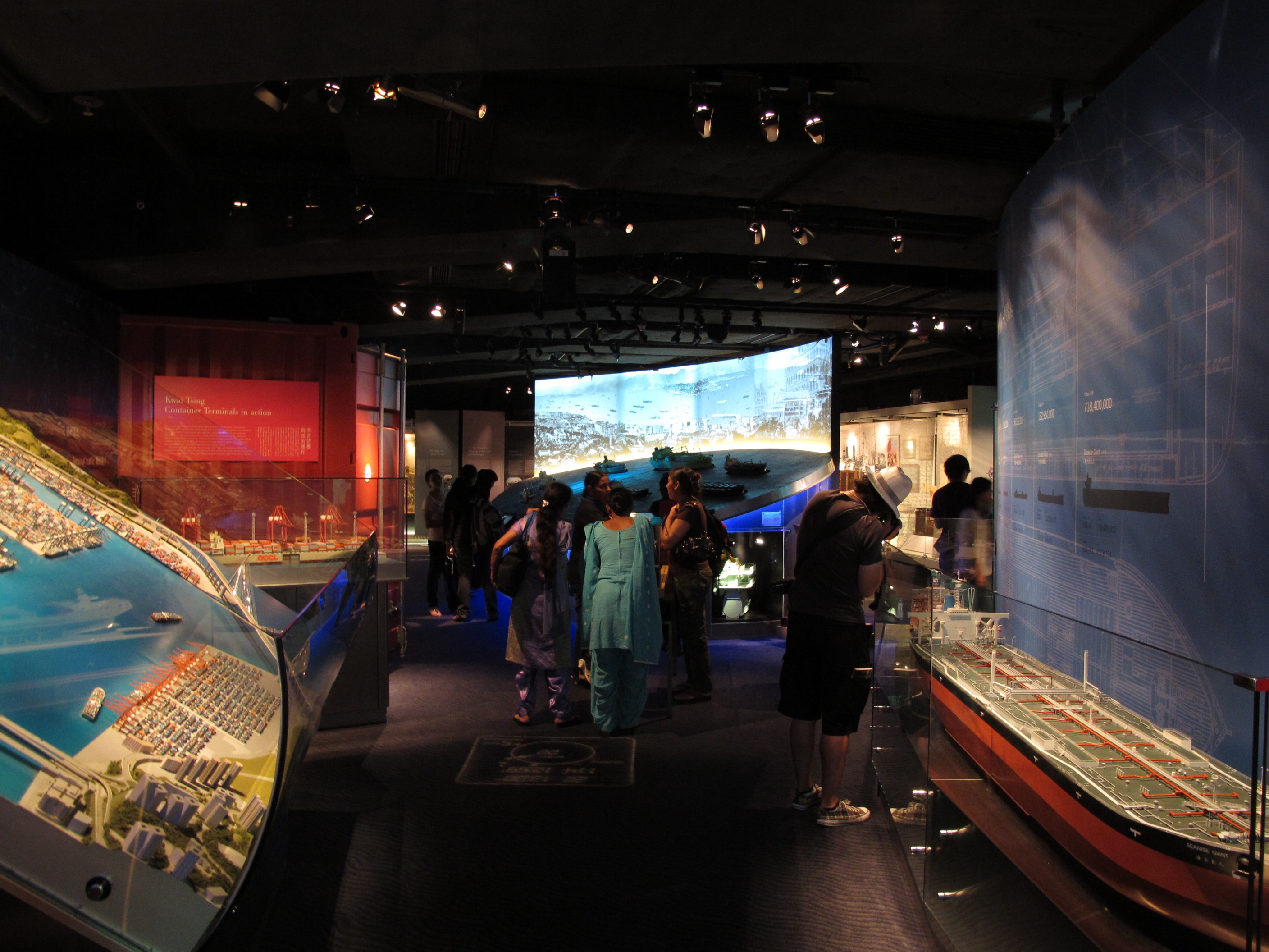 Hong Kong Maritime Museum 香港海事博物館